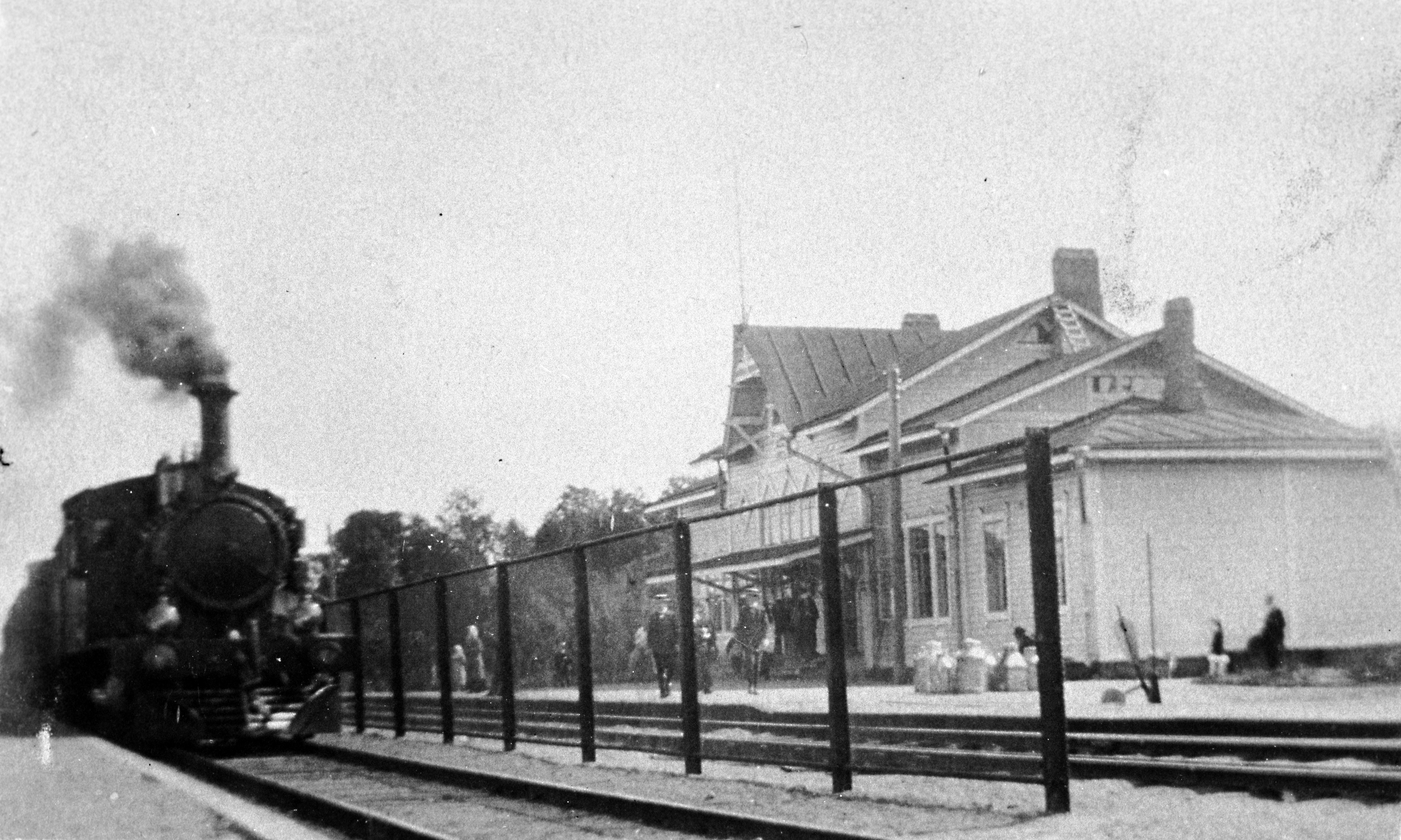 Signum: SLS 1414_214 Fotograf: Okänd Landskap: Nyland, Karis? Datering: Ca 1900-1920 Övrigt: Eventuellt Haveråkersbacken? Ur samlingen Fotografisamling Billnäs bruk. Reprofotografierna är insamlade och inlämnade till arkivet av Kurt Österberg 1980−1982. Arkiv: SLS/Folkkultursarkivet Svenska litteratursällskapet i Finland Help us recognice the photograph. Write a comment or contact us by email. Vet du mer om denna bild? Skriv en kommentar eller kontakta oss per e-post. Tunnistatko kuvan? Jätä kommentti tai lähetä tietosi sähköpostitse. -Oulunkylä (Åggelby) railway station in 1925-1926: per comments later on the photo